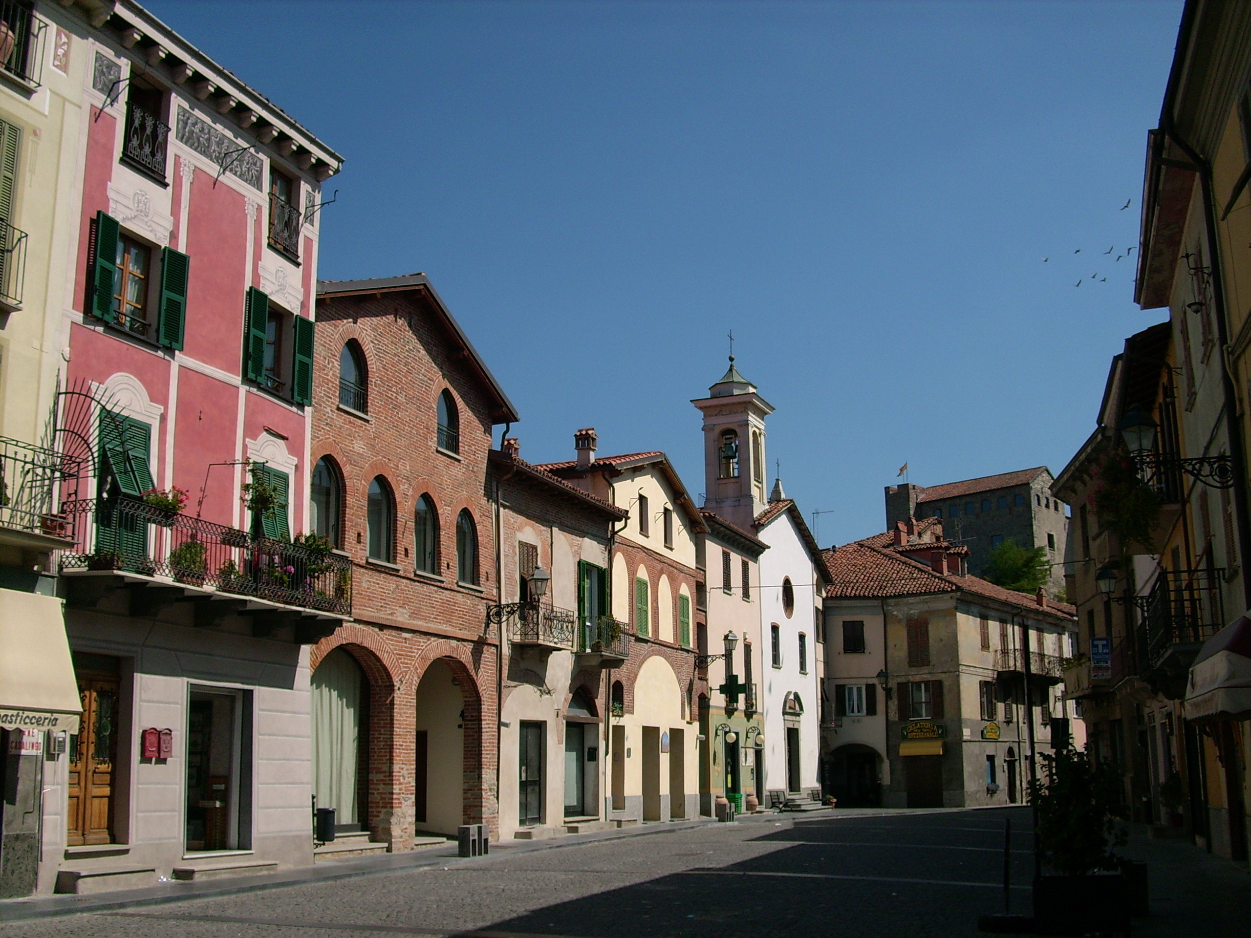 Millesimo, Liguria, Italia